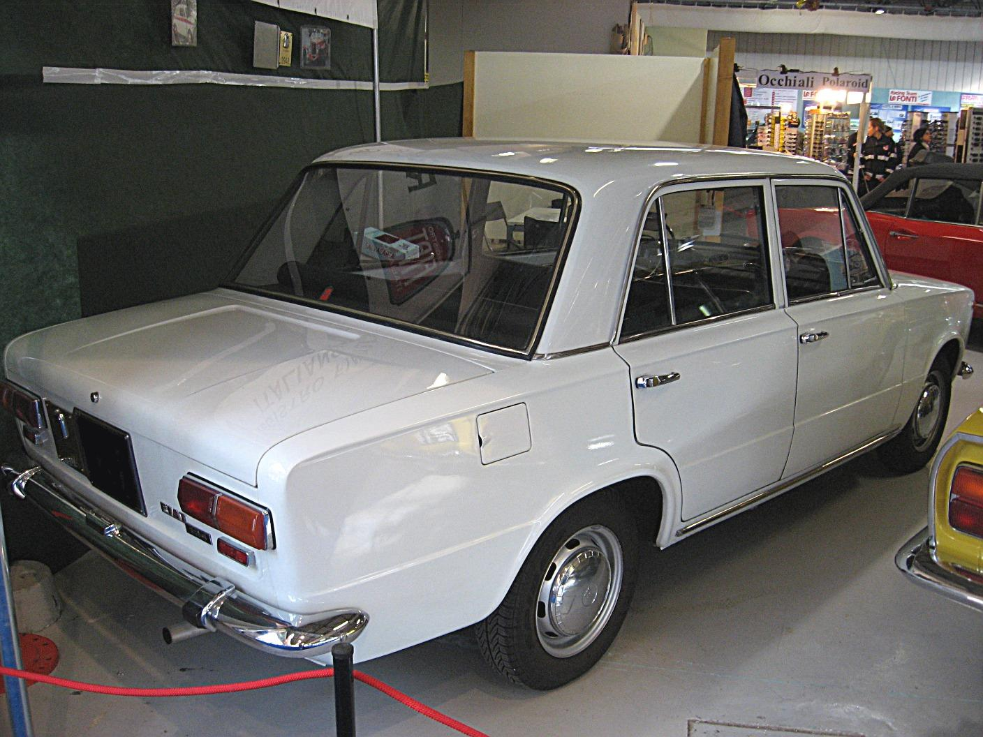 Subject:Fiat 124 berlina